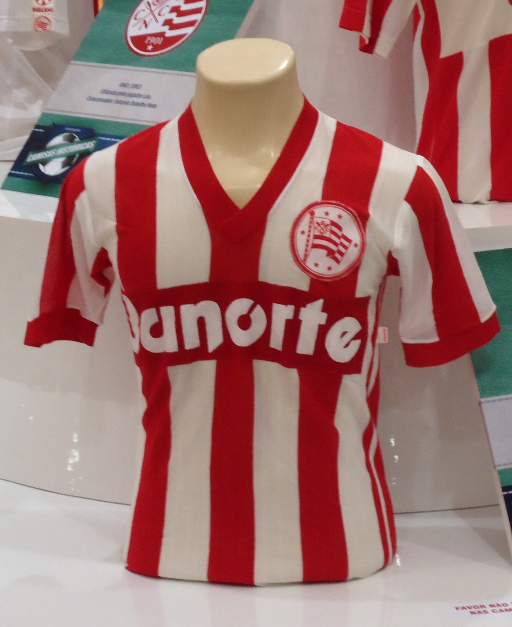 Camisa do Náutico de 1985, na ocasião da conquista do bicampeonato pernambucano. Utilizada por Baiano.